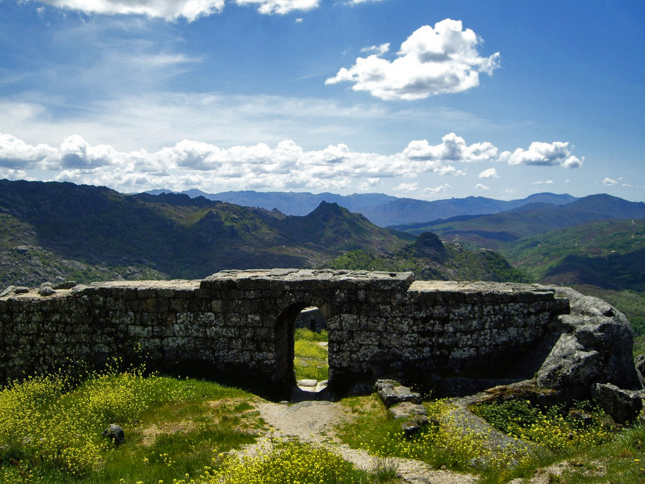 Esta foto participó en Otro lugar de Flirk